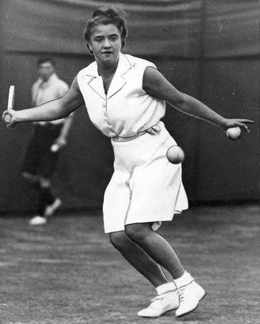 Międzynarodowy Turniej Tenisa Ziemnego na kortach Chiswick w Londynie